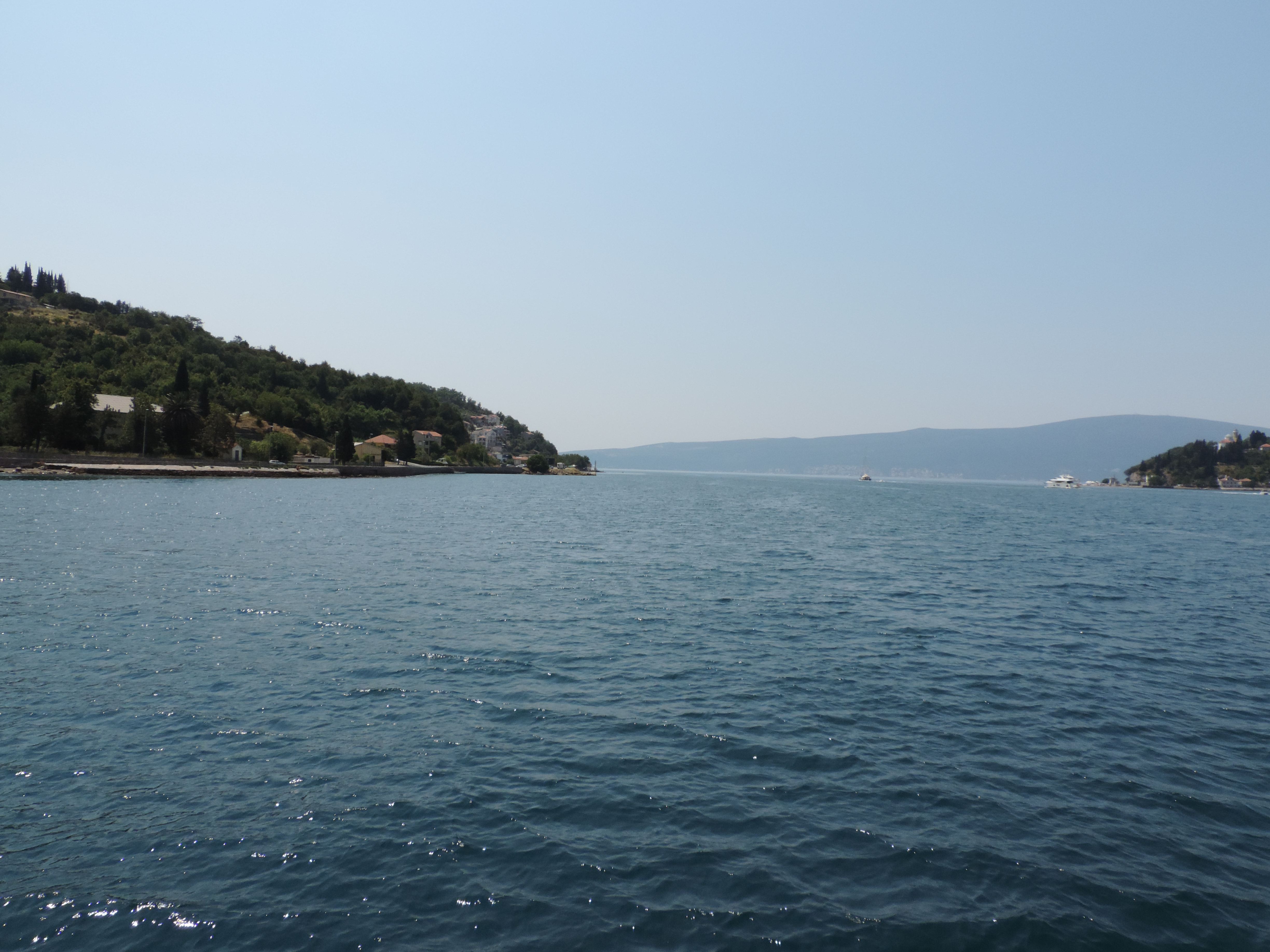 E65, Đurići, Montenegro